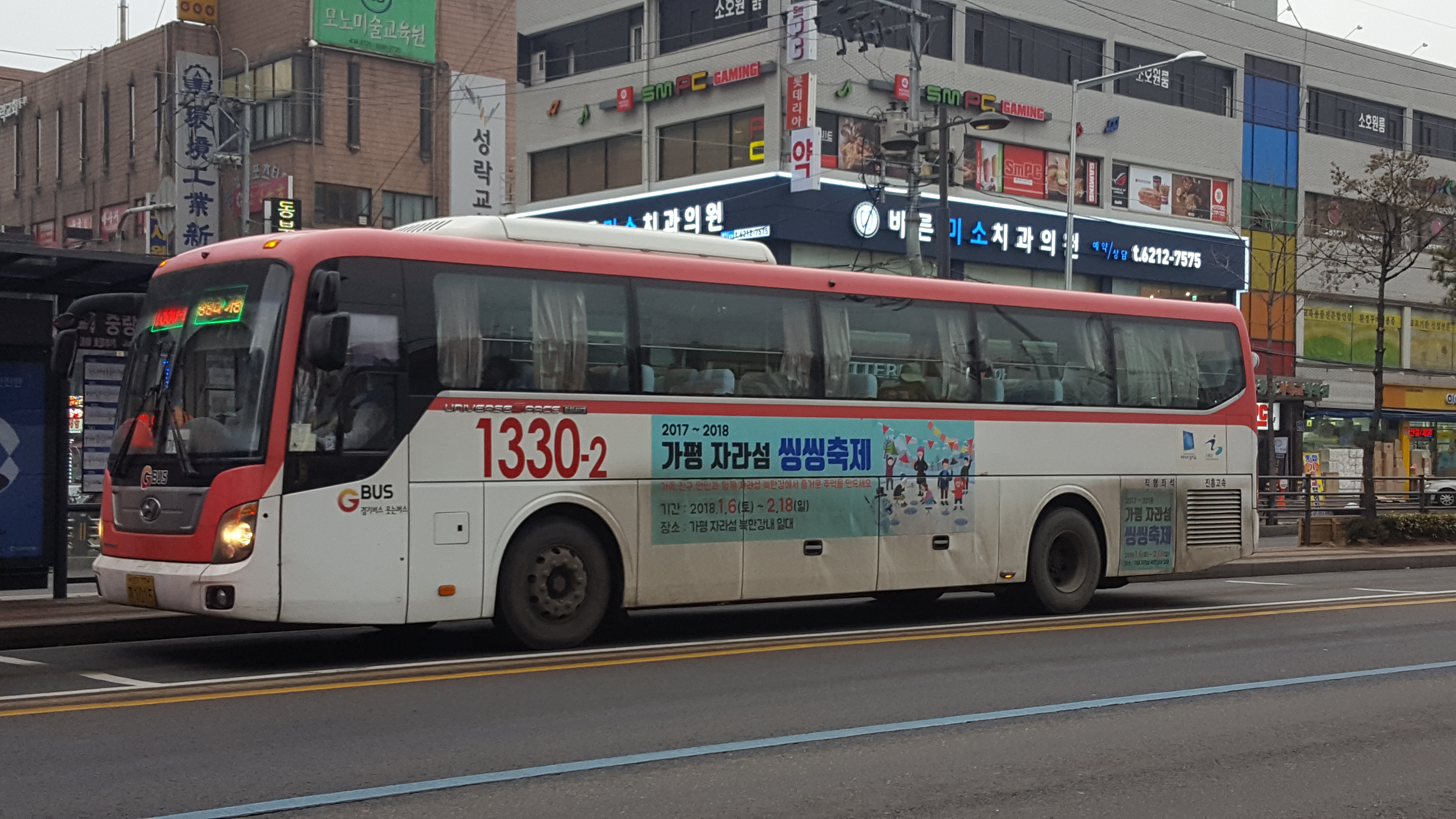 진흥고속의 가평군 직행좌석버스 1330-2번